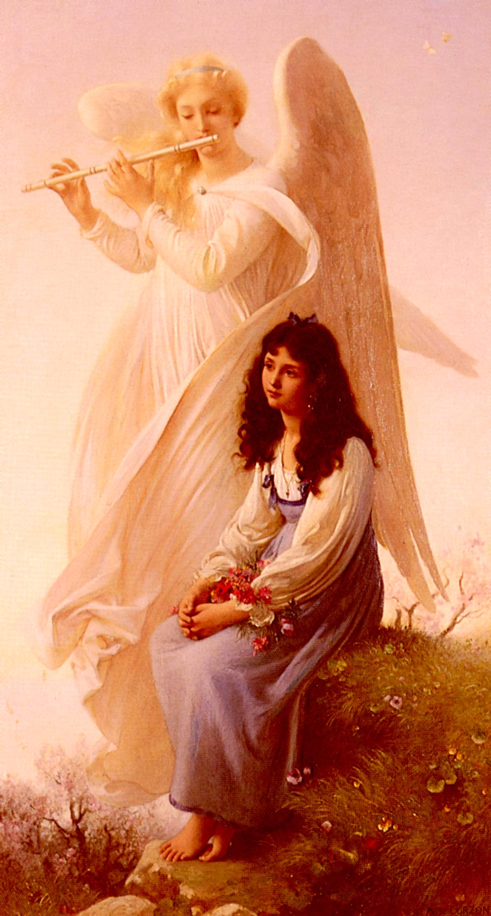 La Jeune Fille à l'Ange